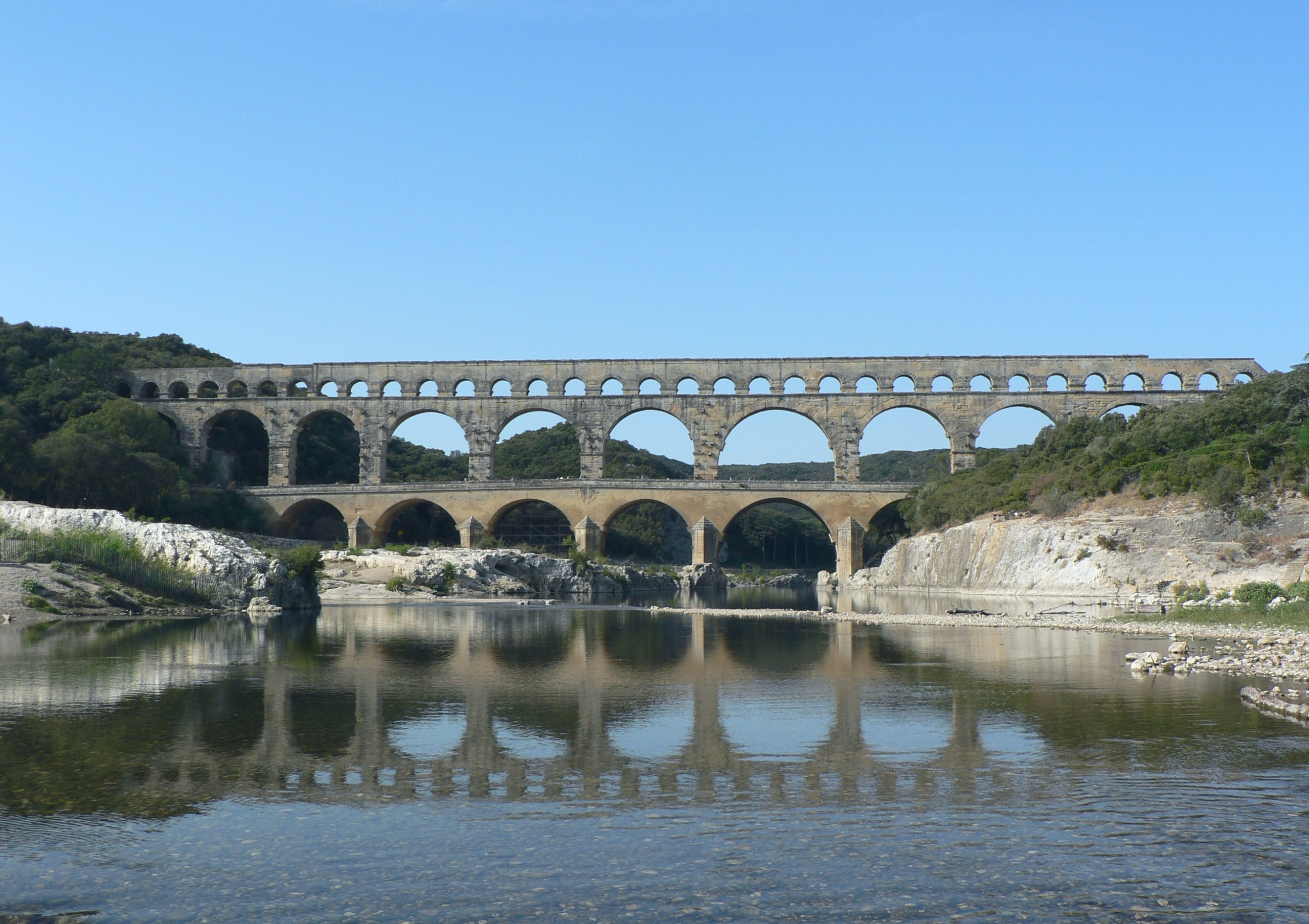 Pont du Gard, aout 2005, Patrick Clenet